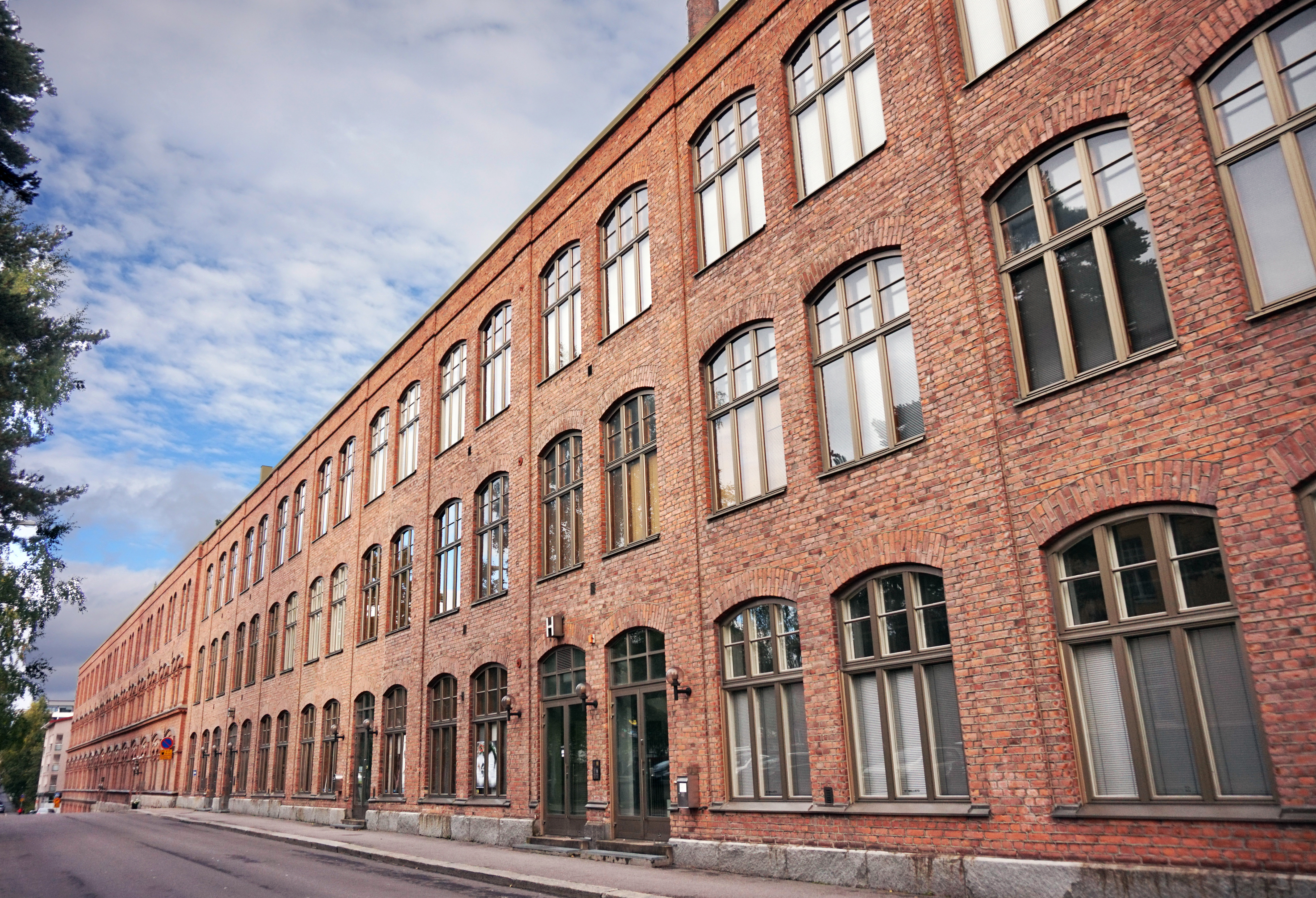 Klingendahl, Tampere. Näkymä Papinkadun puolelta.